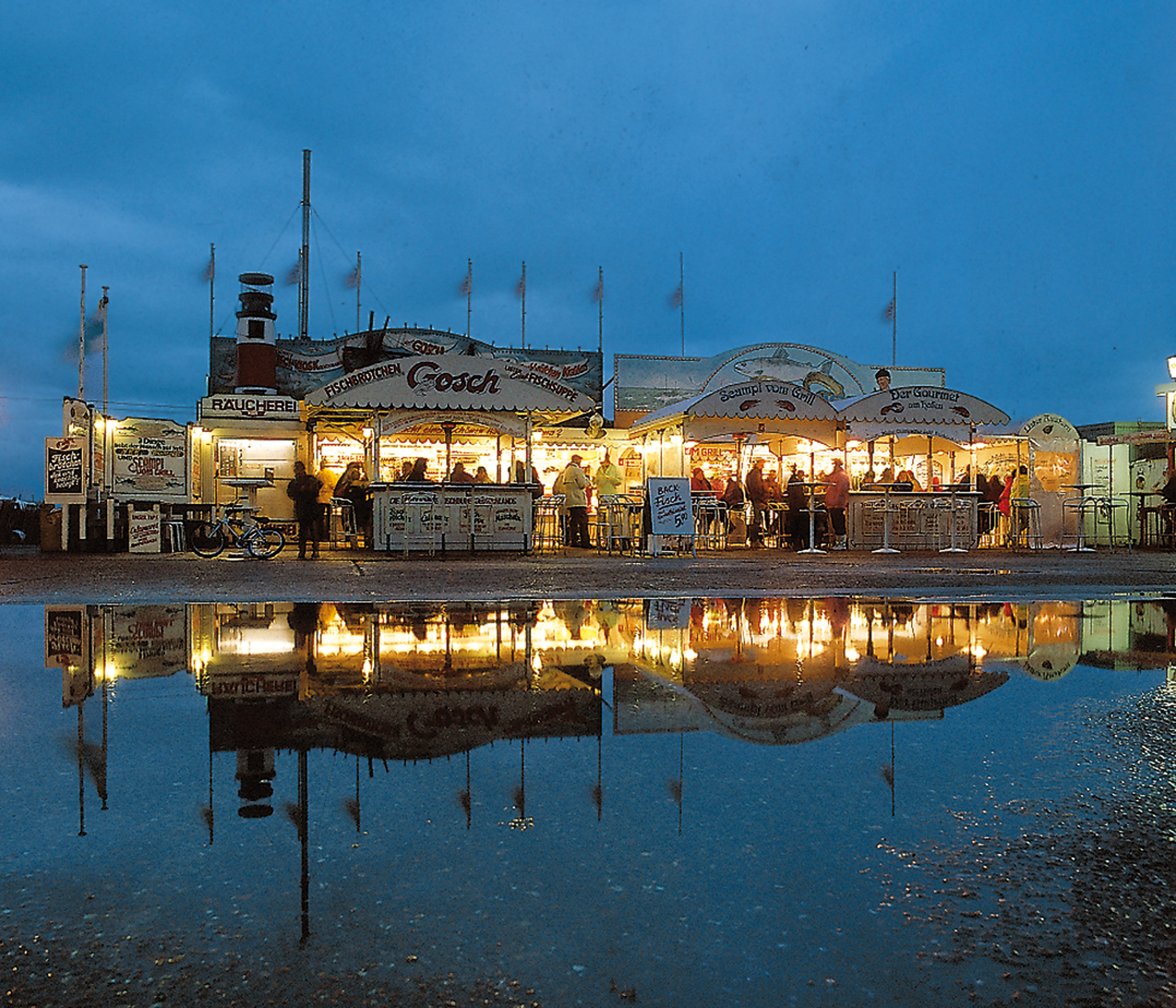 Die Nördlichste Fischbude von Jürgen Gosch in List auf Sylt, 1984